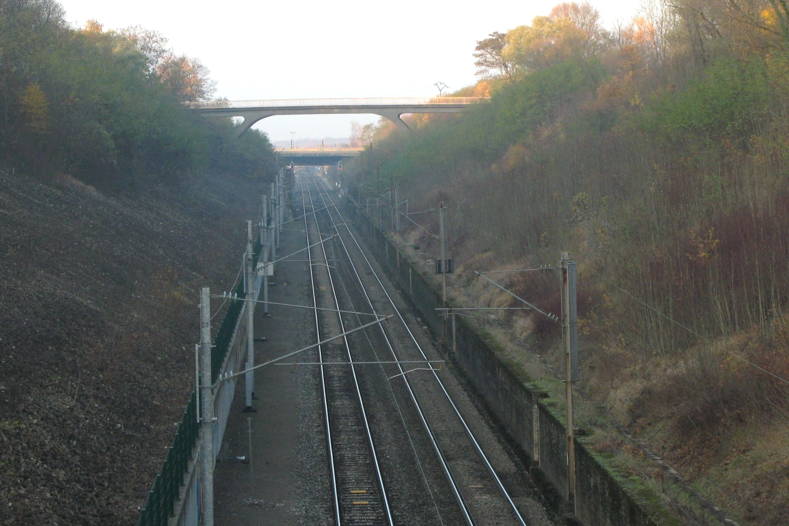 D'Streck Lëtzebuerg-Dijon gesinn vun der Bréck an der Pénkenuecht. D'Streck ass ze gesinn op der Plaz, wou fréier den Diddelenger Tunnel war, an Direktioun Beetebuerg. Kategorie:Eisebunnsstrecken zu Lëtzebuerg